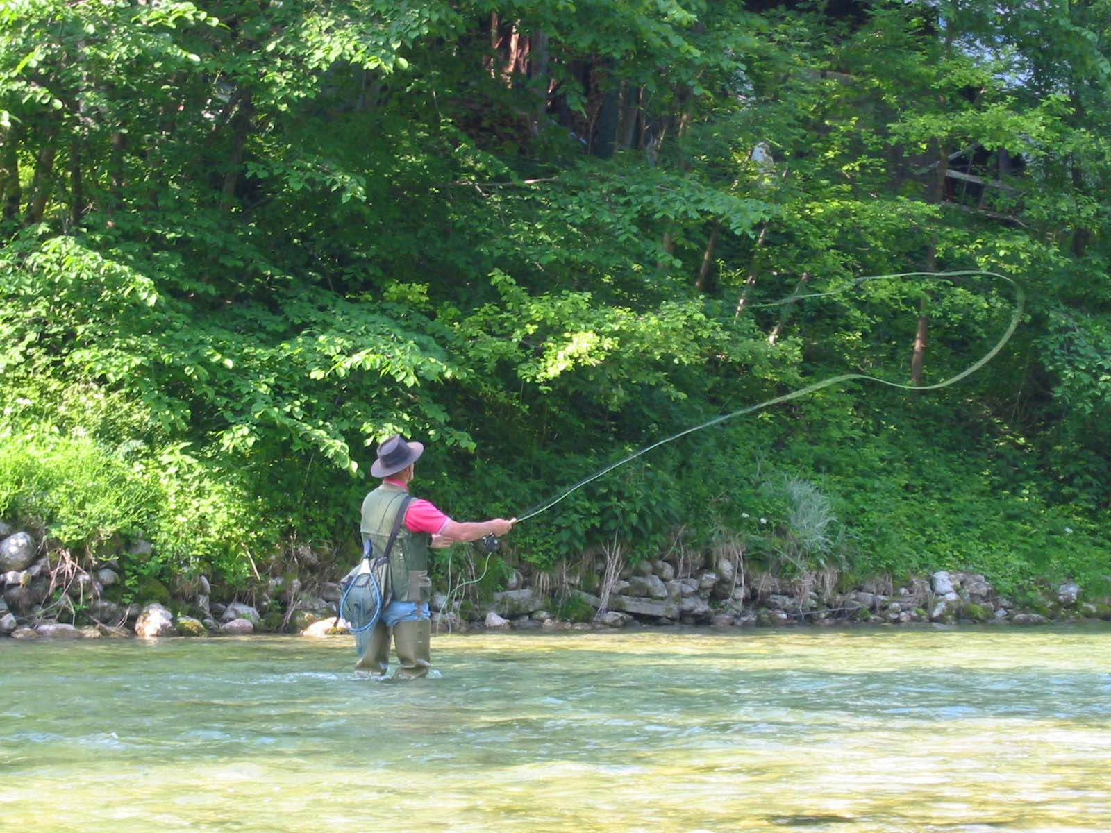 Flyfishing on river Sava Bohinjka, Slovenia